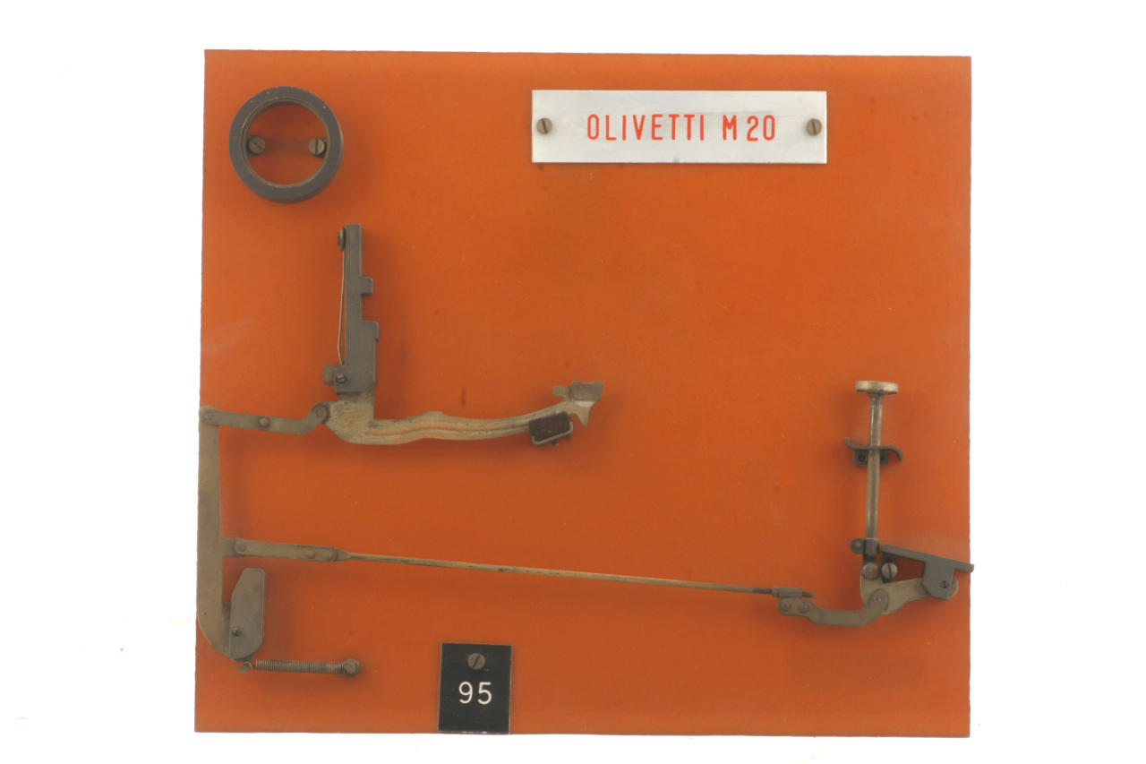 Cinematismo costituito da tre elementi principali in acciaio. Il pistoncino del tasto agisce su una leva sottostante che tramite un tirante aziona il rimando collegato alla leva del martelletto portacaratteri tramite un tirante a spinta (i caratteri riportati sono: "M" e "m"). Il bottone del tasto è in celluloide trasparente con sfondo bianco riportante in nero il carattere "H". Il movimento di ritorno del tasto è guidato da una molla che agisce direttamente sulla leva del martelletto portacaratteri ed è aiutato dalla molla a torsione agente sulla leva centrale o rimando. Il cinematismo è fissato ad un pannello in bachelite. Funzione Stampa del carattere tipografico da parte di una macchina per scrivere. Notizie storico-critiche La collezione consiste in 241 cinematismi di macchine per scrivere, fissati su un supporto in bachelite e originariamente sistemati in 11 pannelli di 199 x 104 cm con intelaiatura in alluminio. I pannelli erano identificati con una lettera da A ad L, con K finale. I cinematismi, a loro volta, sono numerati con un cartellino da 1 (pannello A) a 230 (pannello K), per riprendere da 1 a 9 (pannello K, con cartellino differente). Nel 2008, per esigenze conservative, i pannelli sono stati smantellati e i singoli cinematismi sono stati ricollocati in appositi contenitori La collezione è stata raccolta in un trentennio circa da Matteo Calizzano, progettista di macchine per scrivere, che ha lavorato presso la Antares e la Olivetti. La collezione è stata donata dalla figlia, Ada Calizzano, nel 1987.